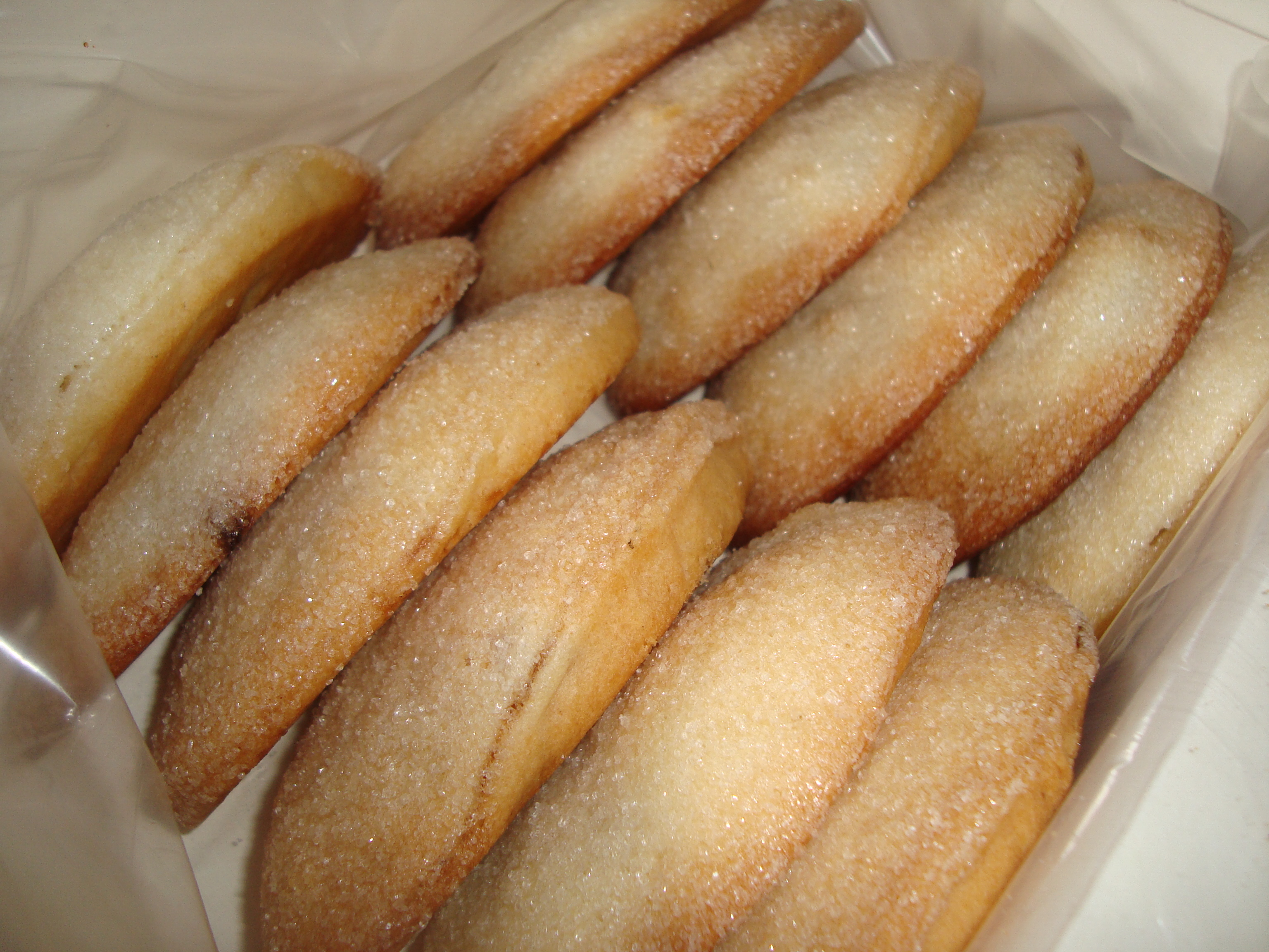 Pastelitos con forma de media luna, rellenos de confituras (calabaza, cabello de angel, boniato), típicos de la gastronomia de las Tierras del Maestrat castellonense (Comunidad Valenciana).